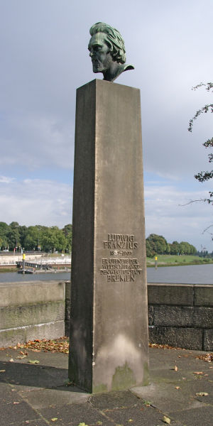 Ludwig Franzius-Denkmal von Georg Roemer in Bremen, an der Werderstraße nahe der Wilhelm-Kaisen-Brücke, unweit der Bremer DGzRS-Station.